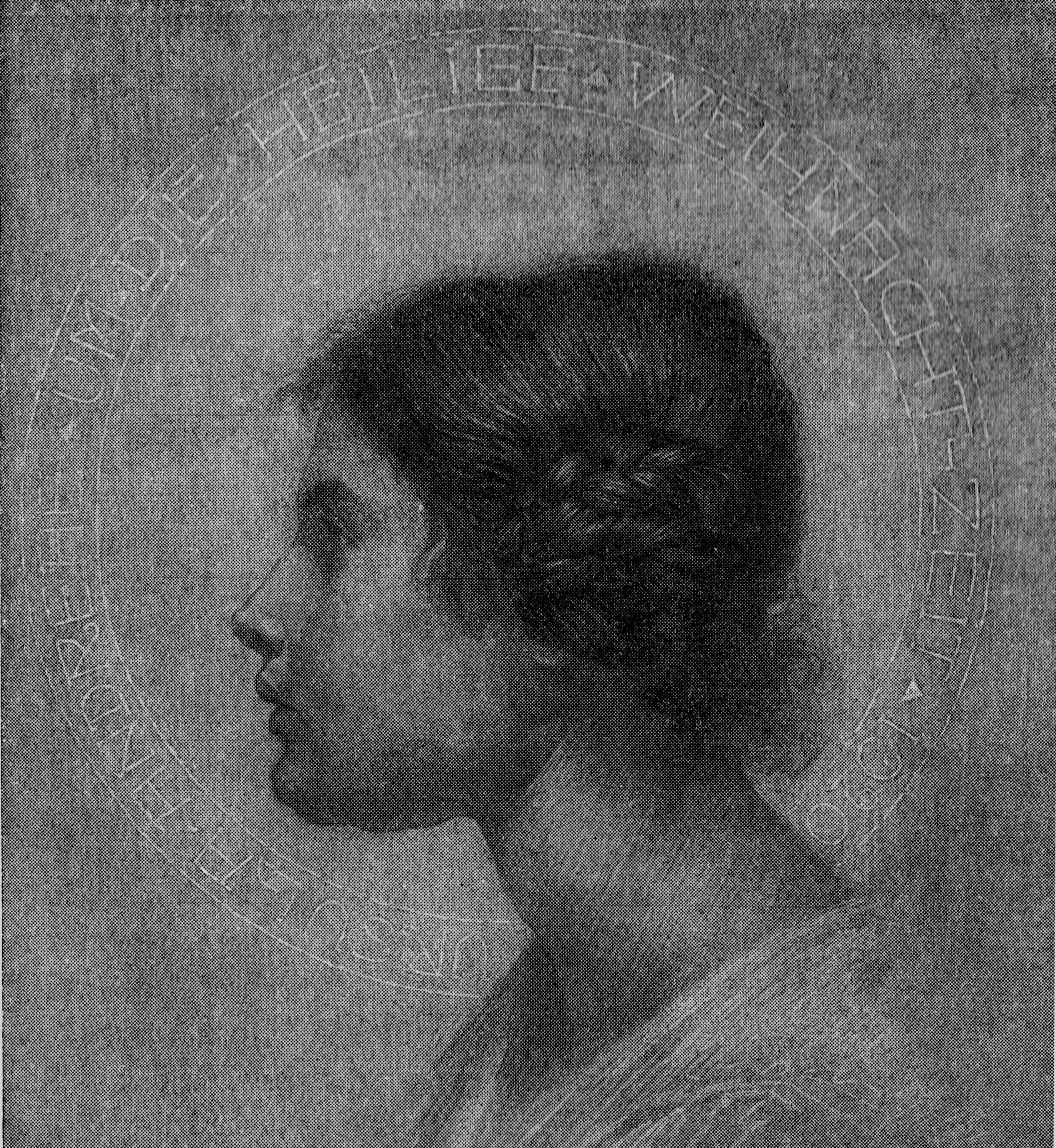 Pastellzeichnung Melchior Lechters der Tochter Fritz Andreaes und Edith Andreaes, geb. Rathenau. im Alter von 16. Jahren. Kreisförmig ist im Hintergrund folgende Inschrift zu erkennen: URSULA_ANDREAE_-_UM_DIE_HEILIGE_WEIHNACHT_ZEIT_1920